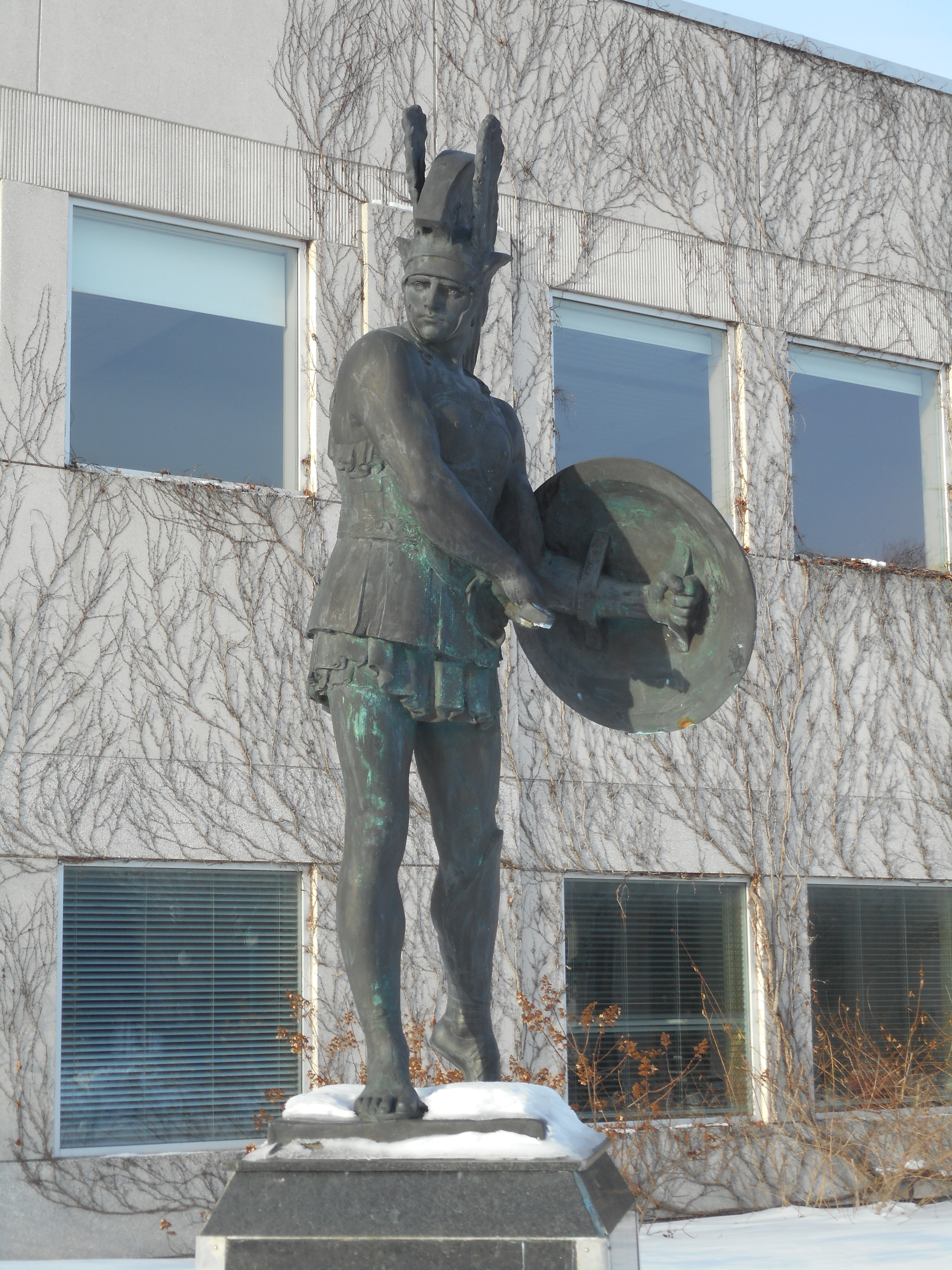 Devant le Centre Leonardo da Vinci, à Montréal, se dresse une statue en bronze d'un gladiateur. Il sagit d'une copie d'une sculpture réalisée en 1922 par Giuseppe Guastalla (1867-1952) pour un monument aux morts de la guerre installé à Pietrabbondante, une commune de la région de Molise en Italie. Elle représente un guerrier samnite. Sur la plaque est gravé : « Le guerrier samnite, symbole d'union des molisans dans le monde, emblème de fraternité entre les peuples. »